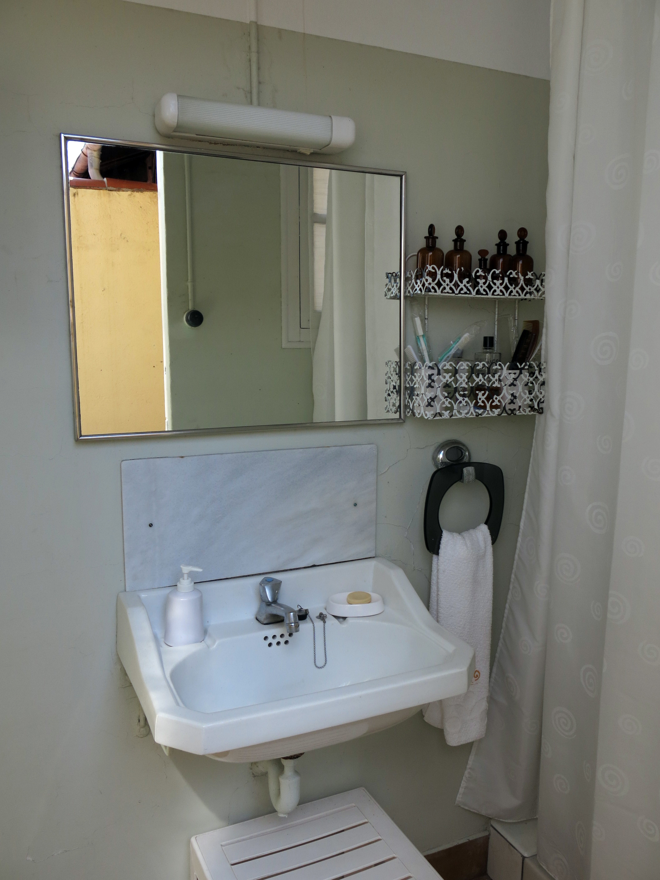 Colònia industrial de Borgonyà (Sant Vicenç de Torelló)